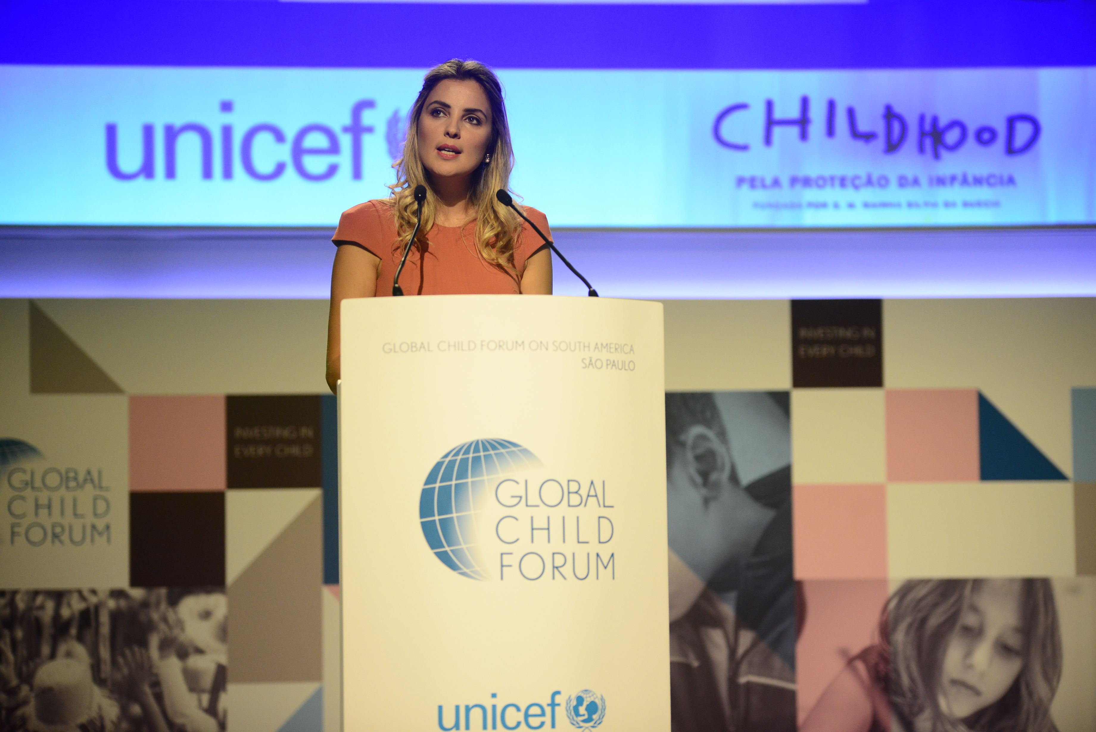 São Paulo (SP), 04/04/2017 - O ministro do Desenvolvimento Social e Agrário, Osmar Terra, acompanhou o presidente da República Michel Temer e a primeira-dama Marcela Temer no Global Child Forum, na sede da Fiesp. O rei da Suécia Carlos XVI Gustavo e a rainha Silvia da Suécia prestigiaram o evento, promovido pelo Unicef e pela Childhood Brasil - braço da World Childhood Foundation. No fórum, mais de 300 lideranças de empresas, governos, universidades e sociedade civil discutiram a garantia e a promoção dos direitos das crianças. Fotos: Mauro Vieira/MDSA